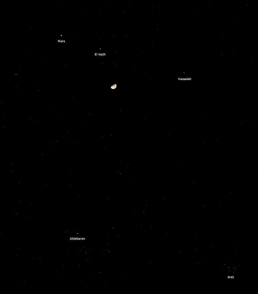 Rapprochement Lune/Mars.